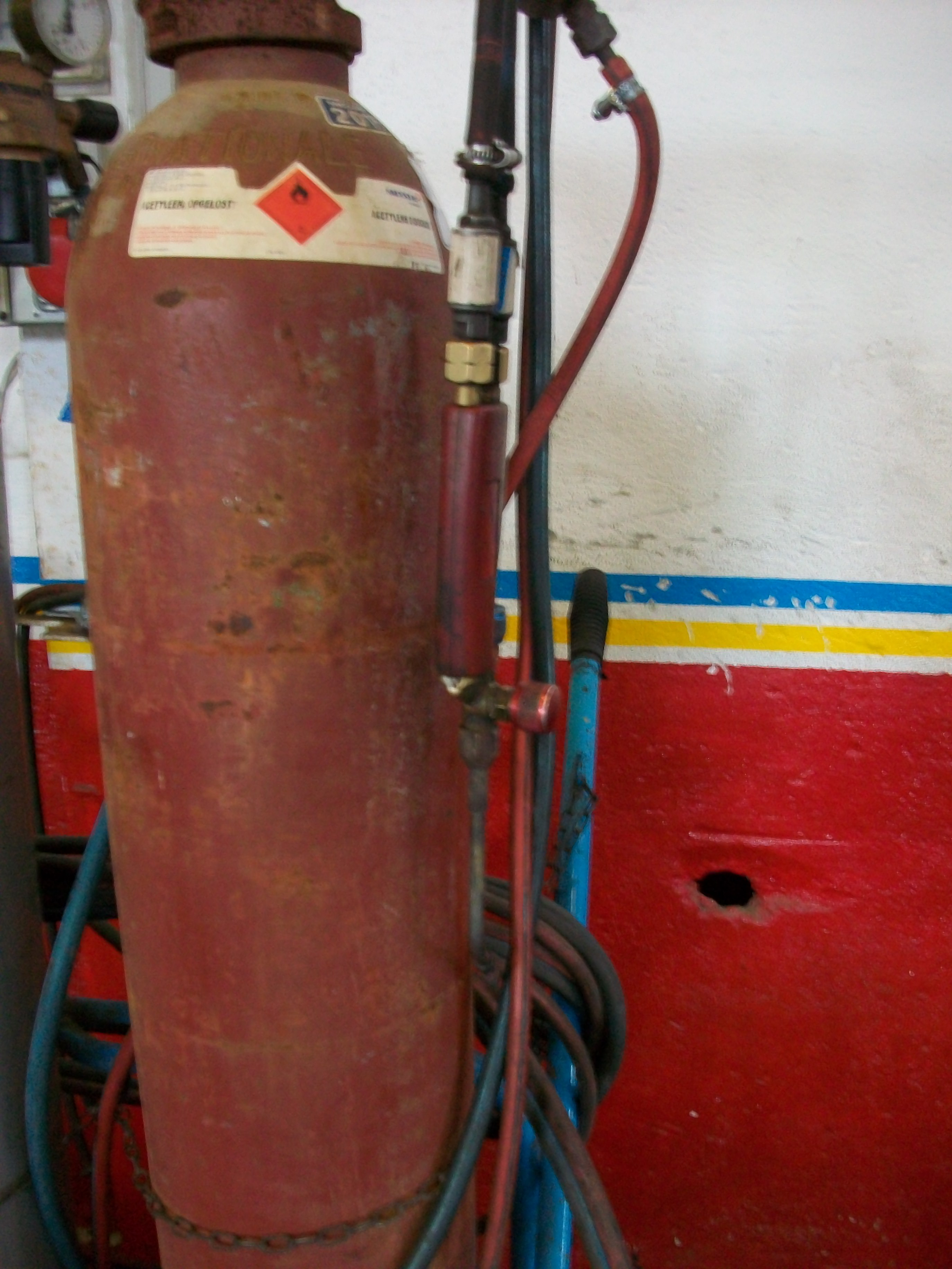 Imagen de una botella de acetileno